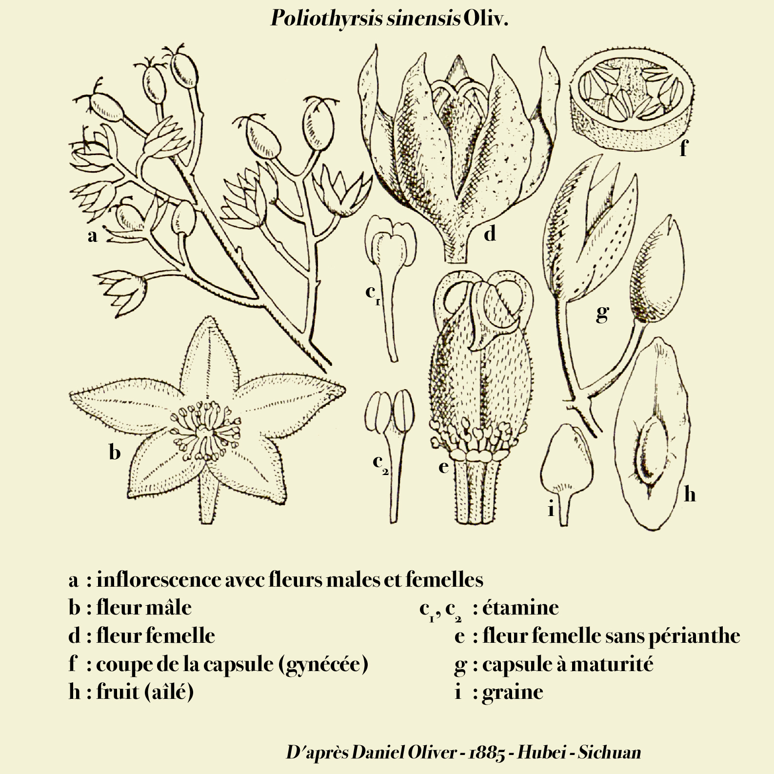 Schéma de l'inflorescence de Poliothyrsis sinensis - D'après une planche de Daniel Oliver - 1885